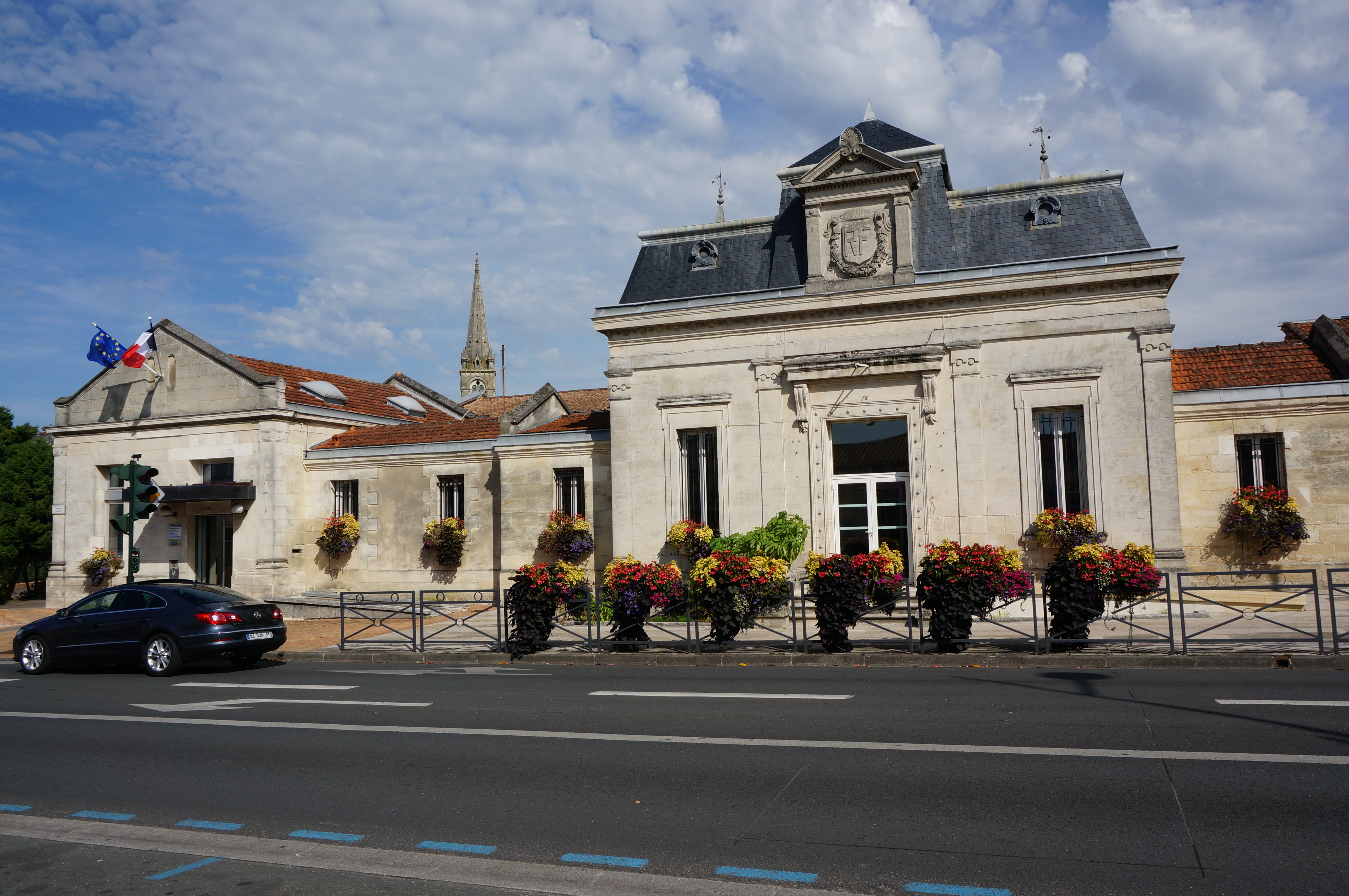 Entrée de la mairie du Haillan, en Gironde. Bâtiment édifié en 1883.